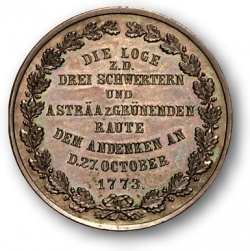 Bijou Zur Gründenden Raute Rückseite 1873